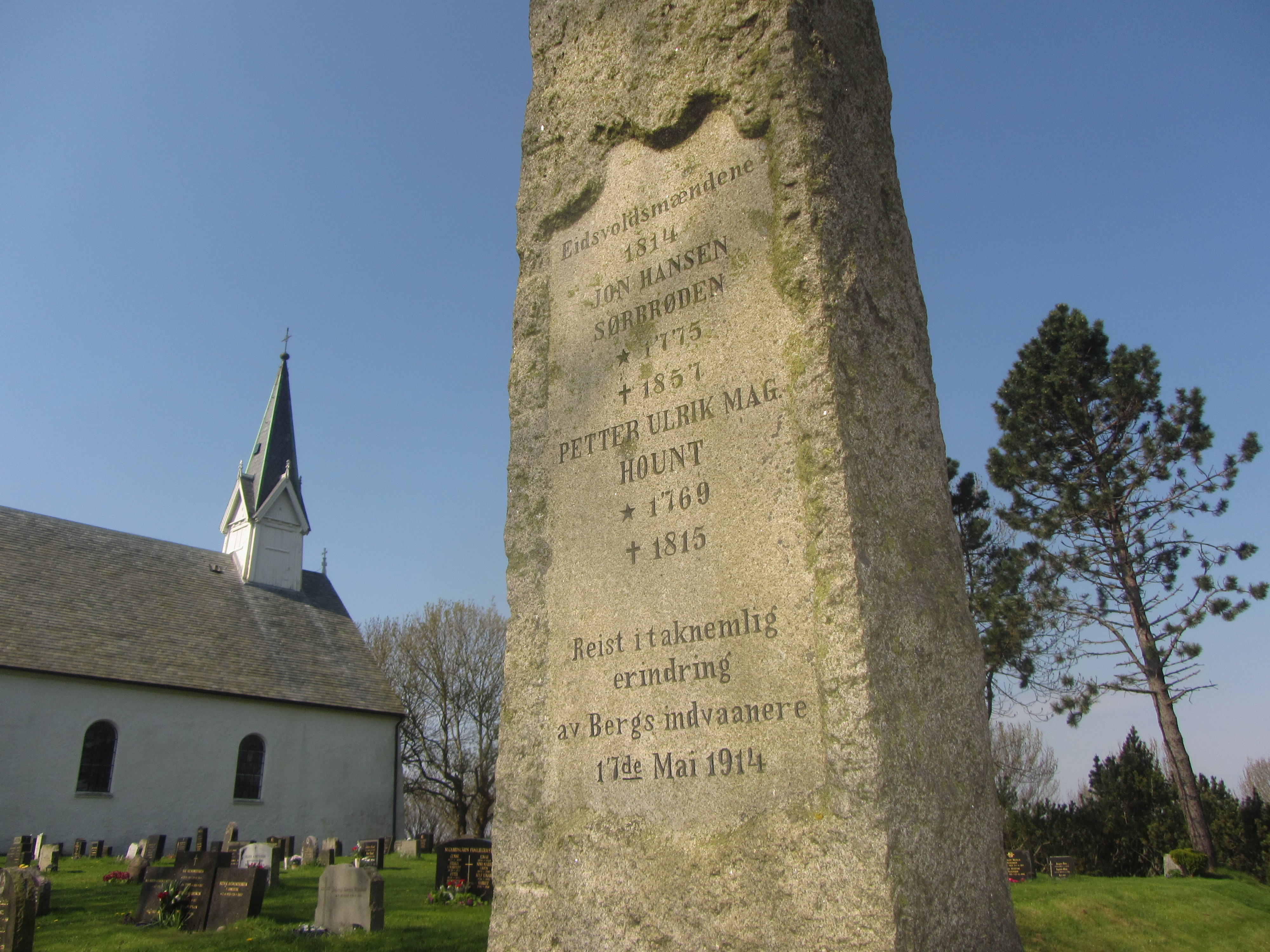 Bauta ved Berg kirke i Halden over eidsvollsmennene Jon Hansen Sørbrøden (1775-1857) og Petter Ulrik Magnus Hount (1769-1815), avduket 17. mai 1914.